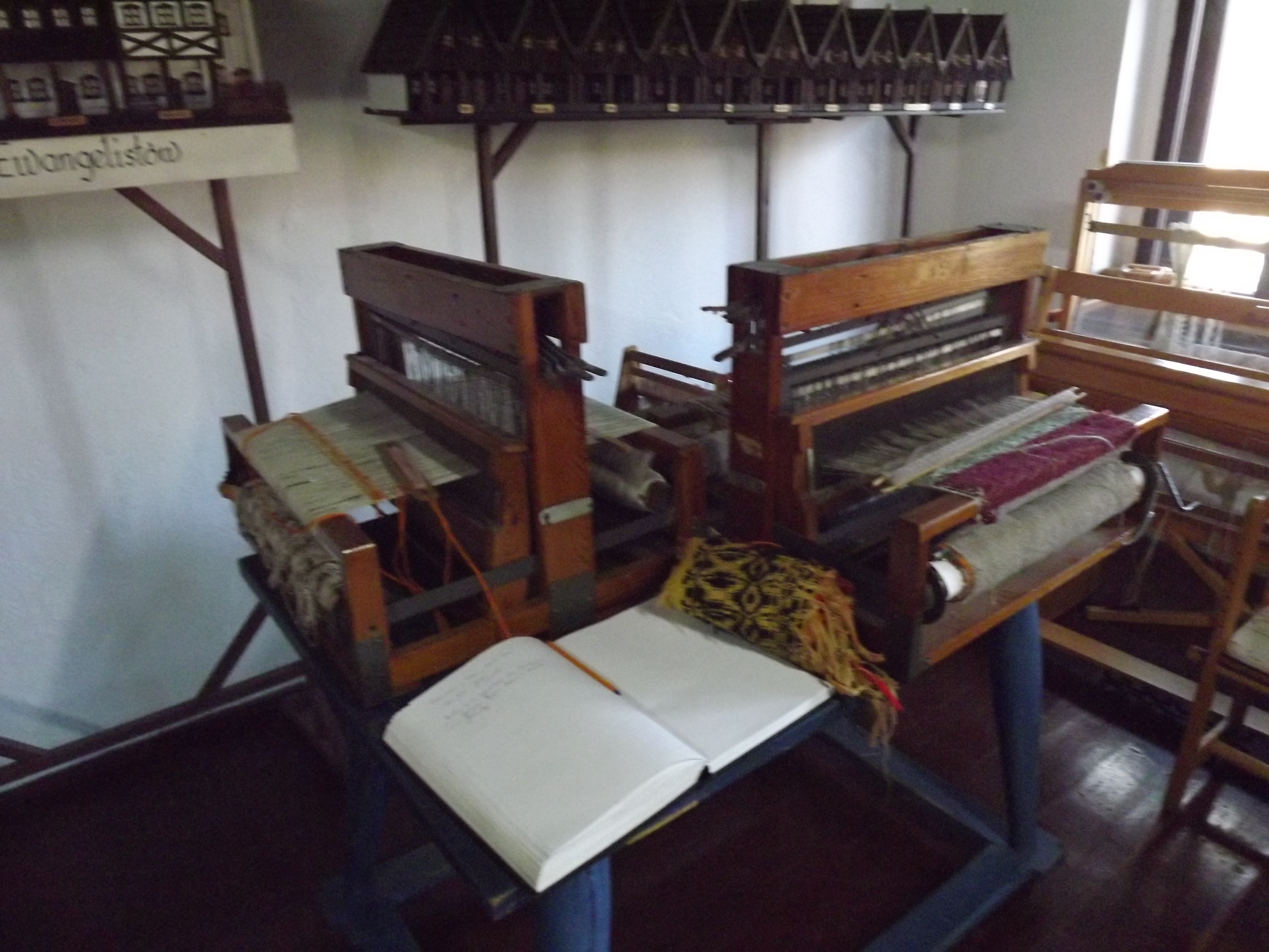 Izba tkacka w Domku Tkaczy - ul. Sądecka 15